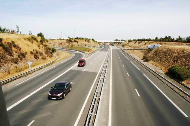 Français